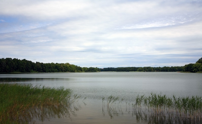 Ublik, województwo warmińsko-mazurskie, powiat piski, gmina Orzysz